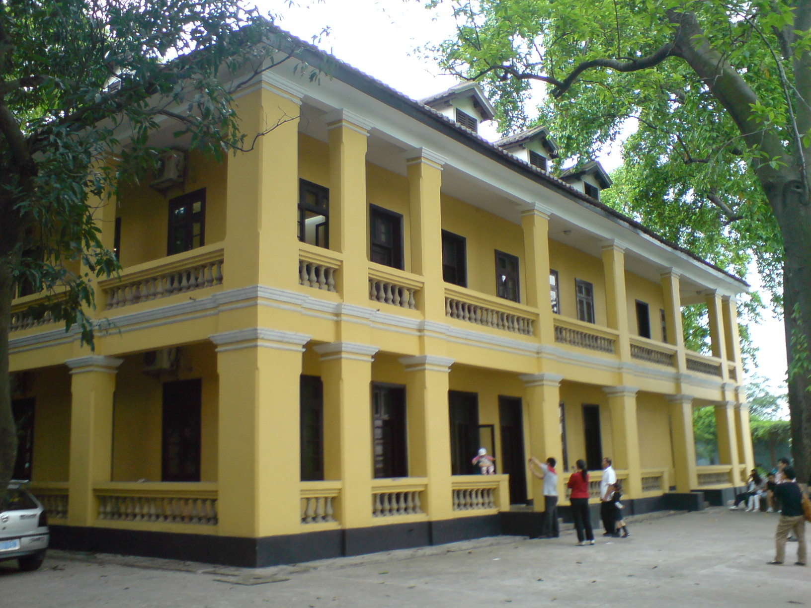 中文（中国大陆）: 广州长洲岛孙中山先生故居